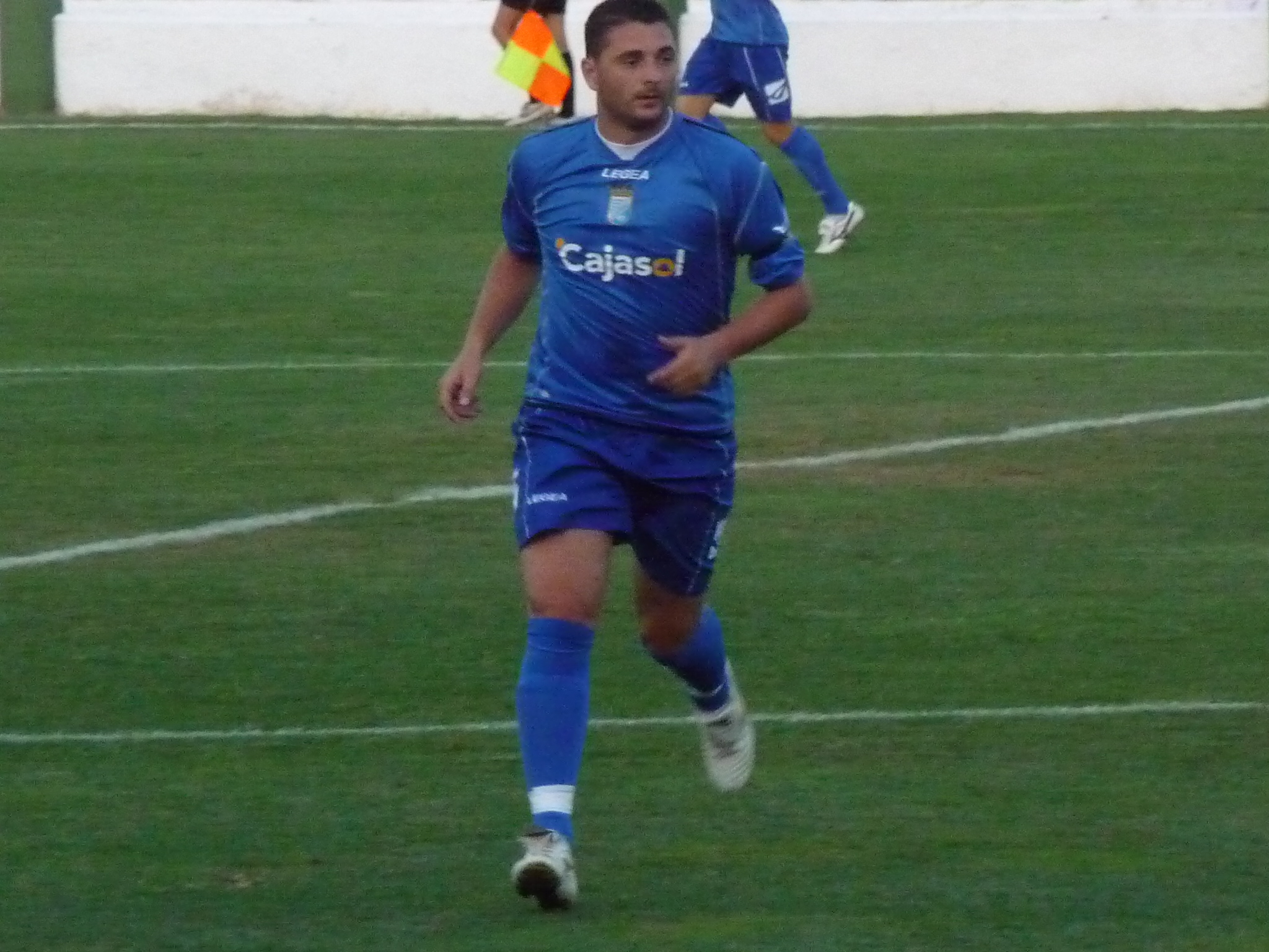 Viqueira-XerezCD-p1040379.jpg